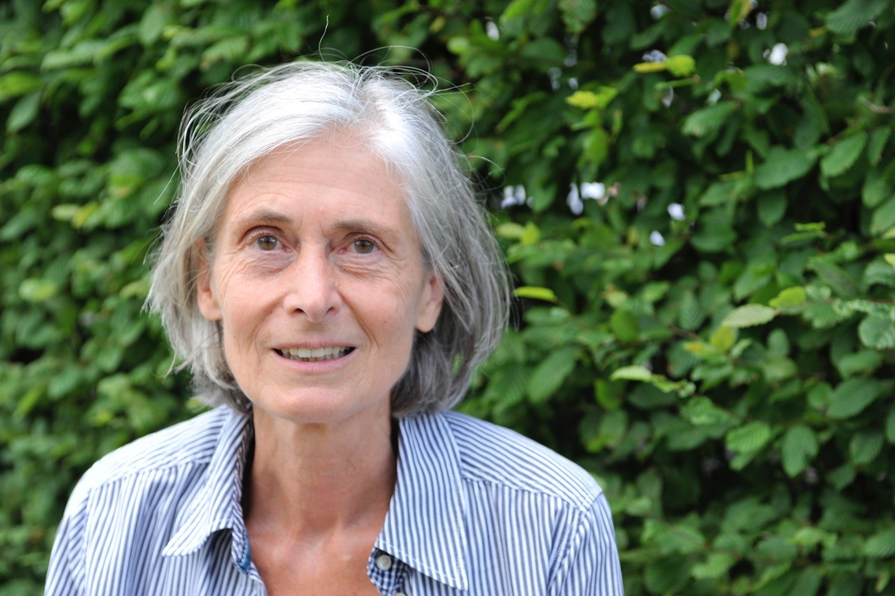 Porträtfotografie der Professorin Dr. phil. Annelore Engel